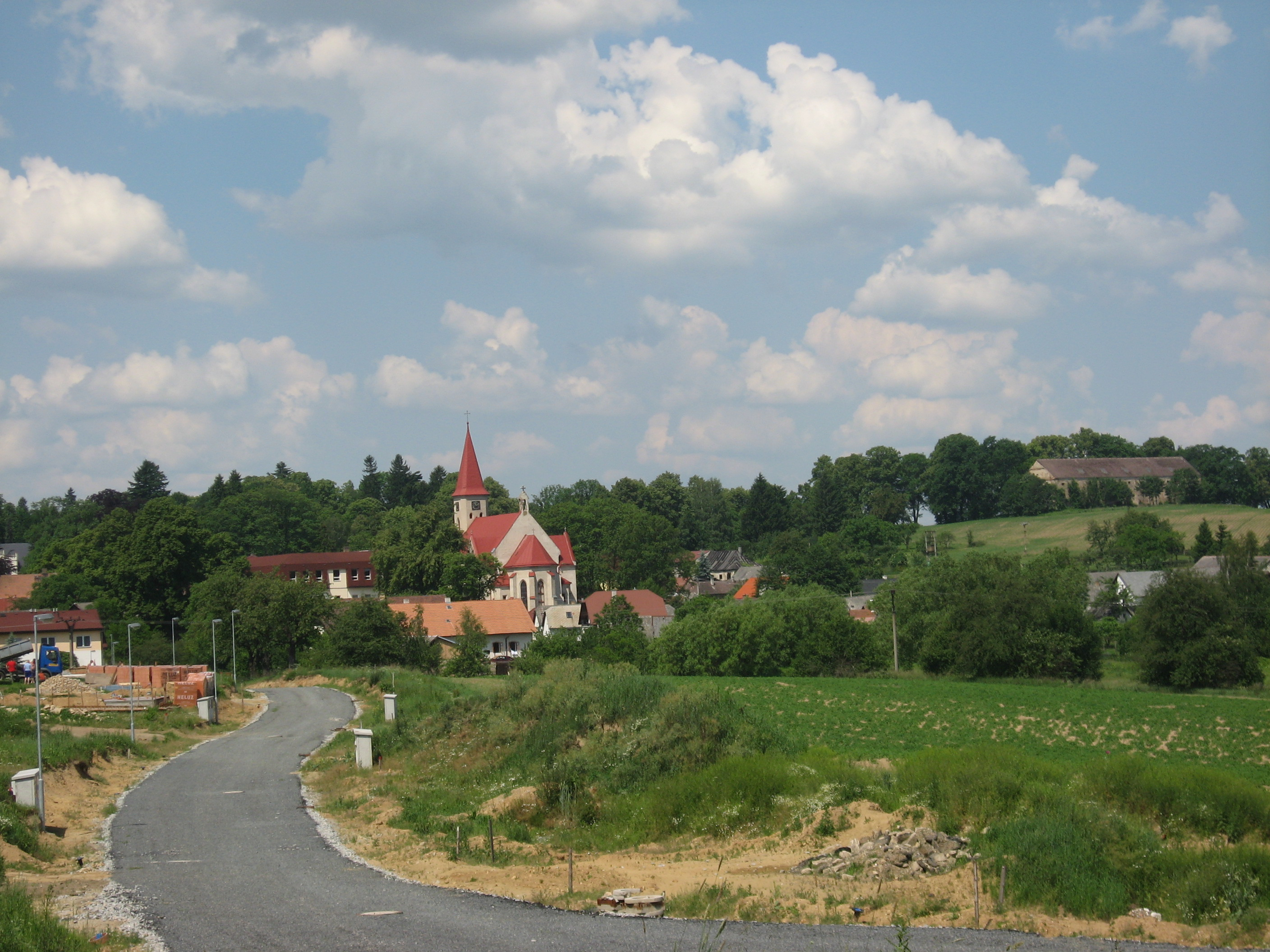 Herálec, pohled na obec